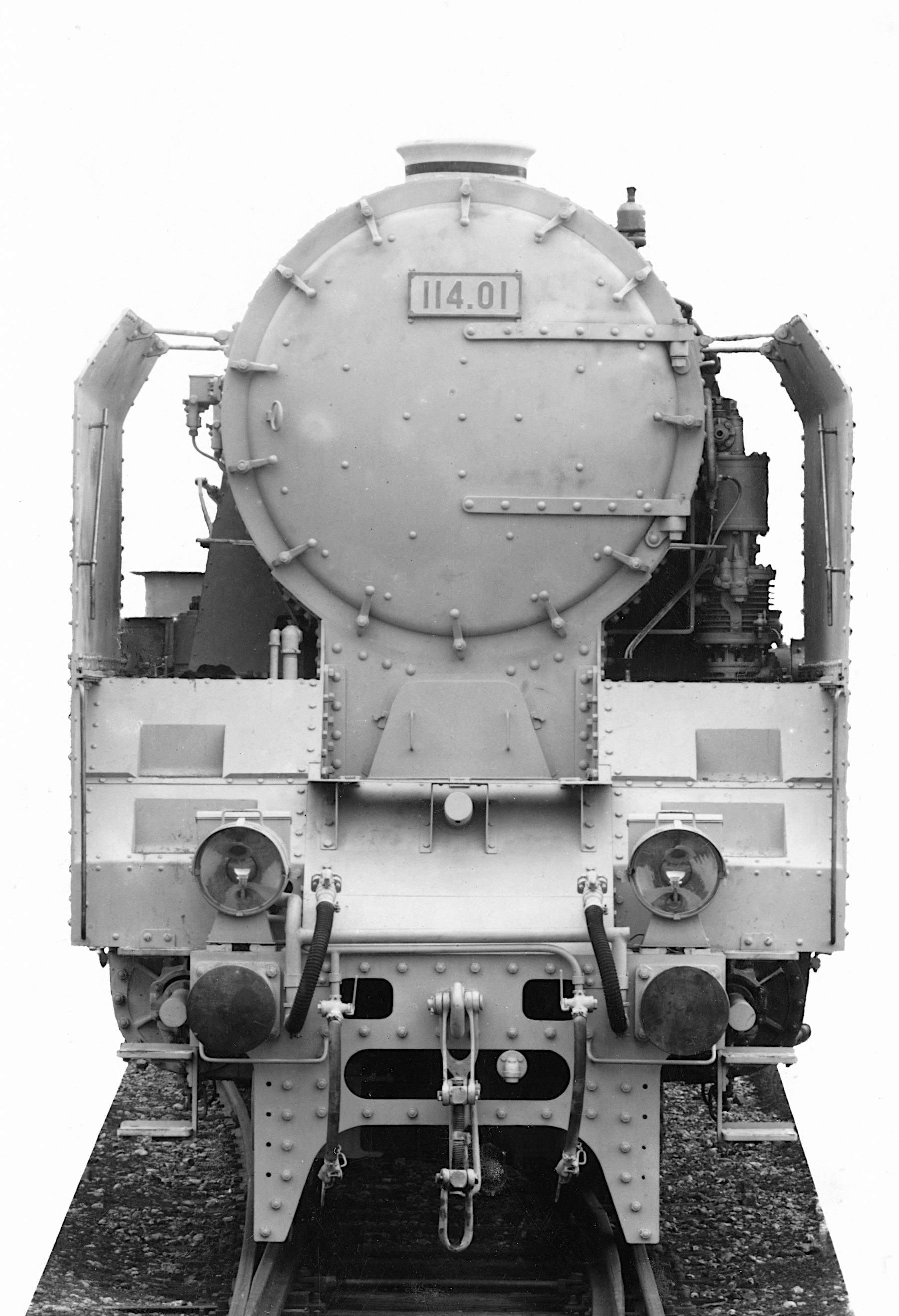 Werksfotografie der BBÖ 114.01 vor der Wr. Neustädter Lokomotivfabrik im grauen Fotografieranstrich, vorne